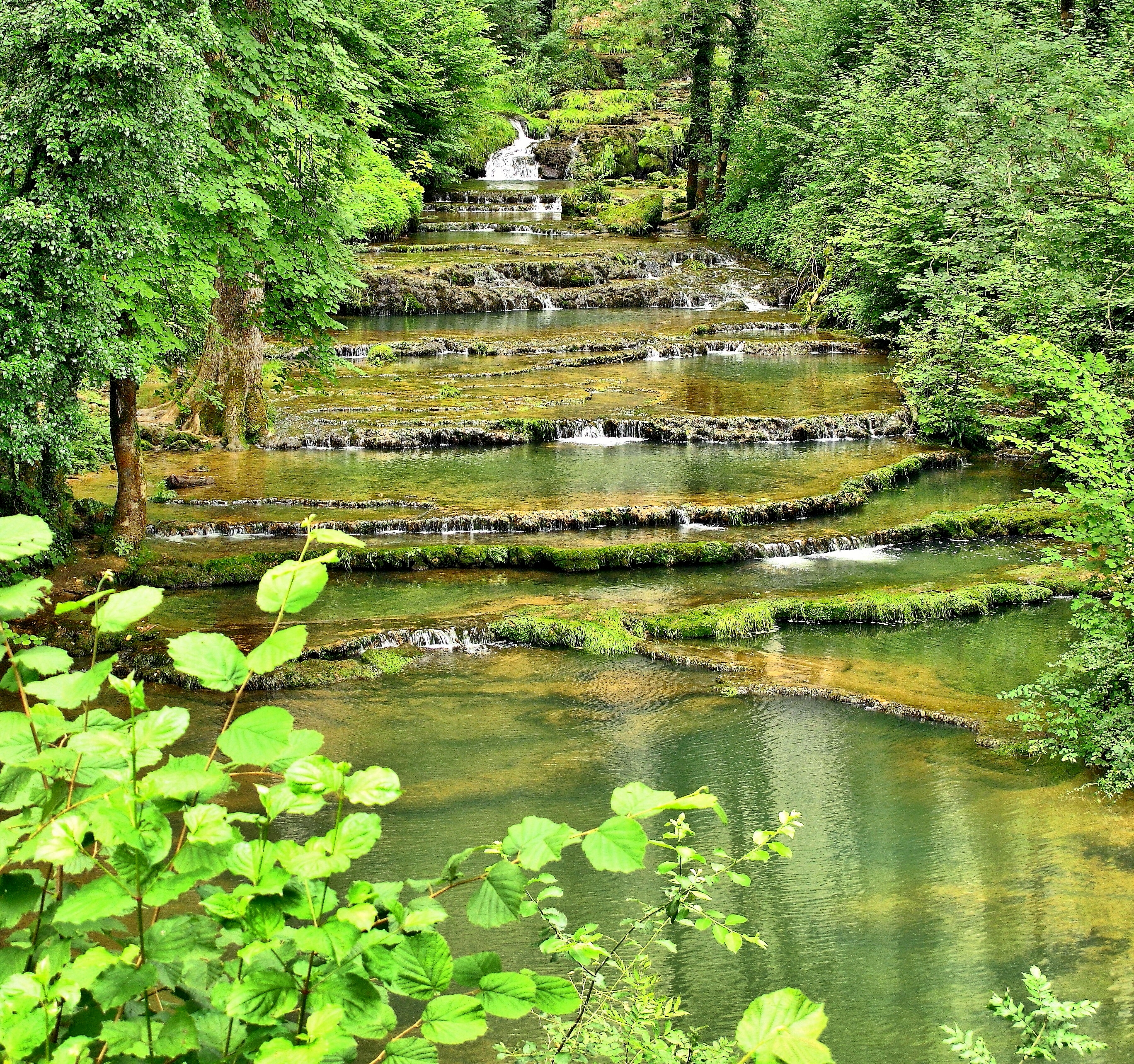 Gours sur le Dard près de sa source